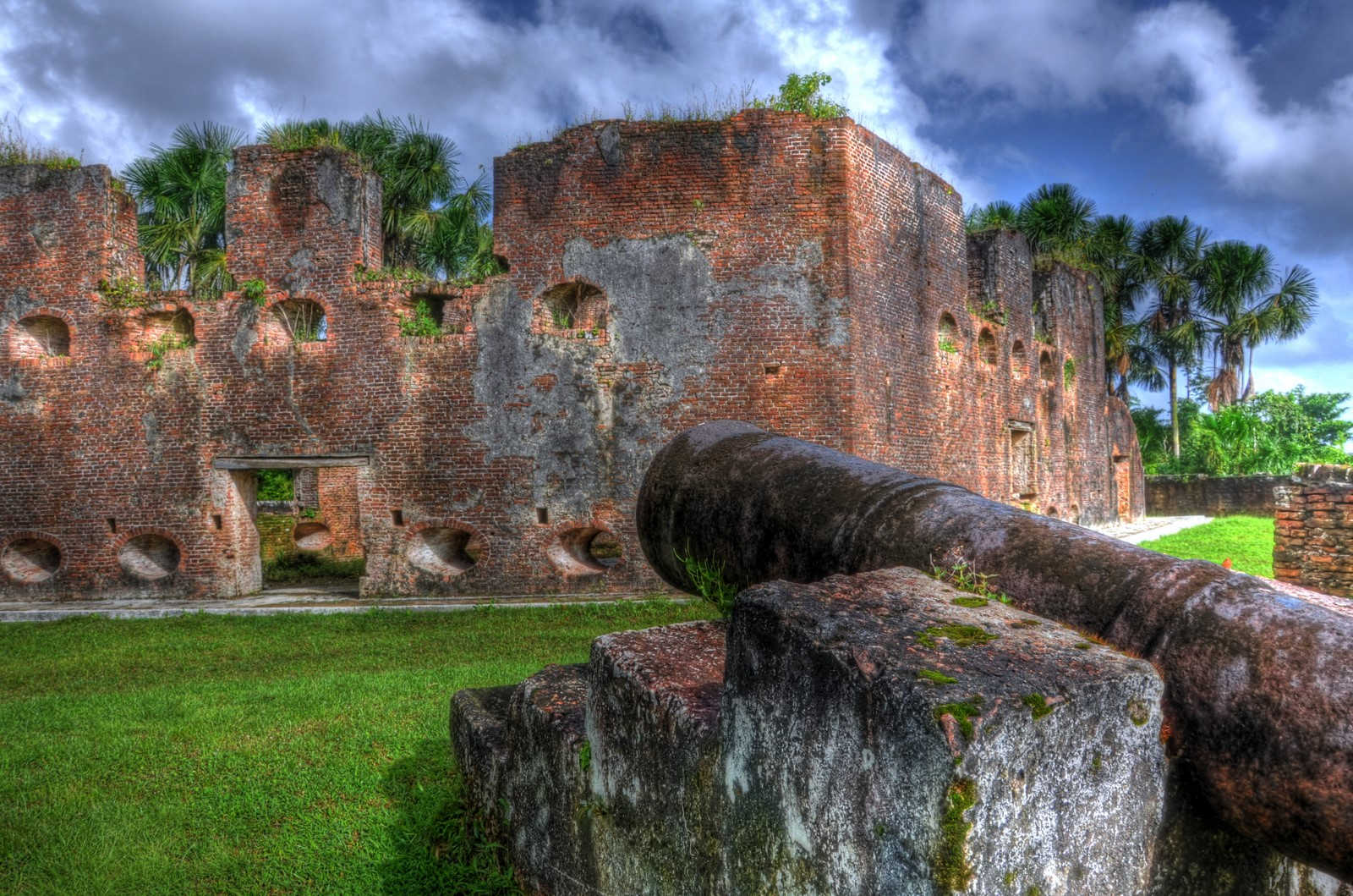 Fort HDR